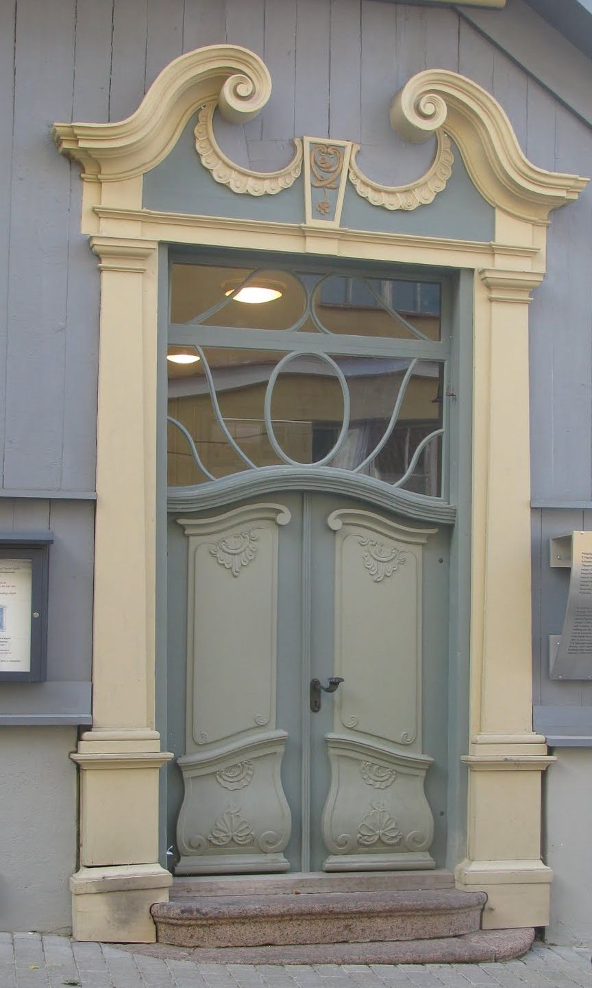 Elamu Tartus Lutsu 2, 18.saj.